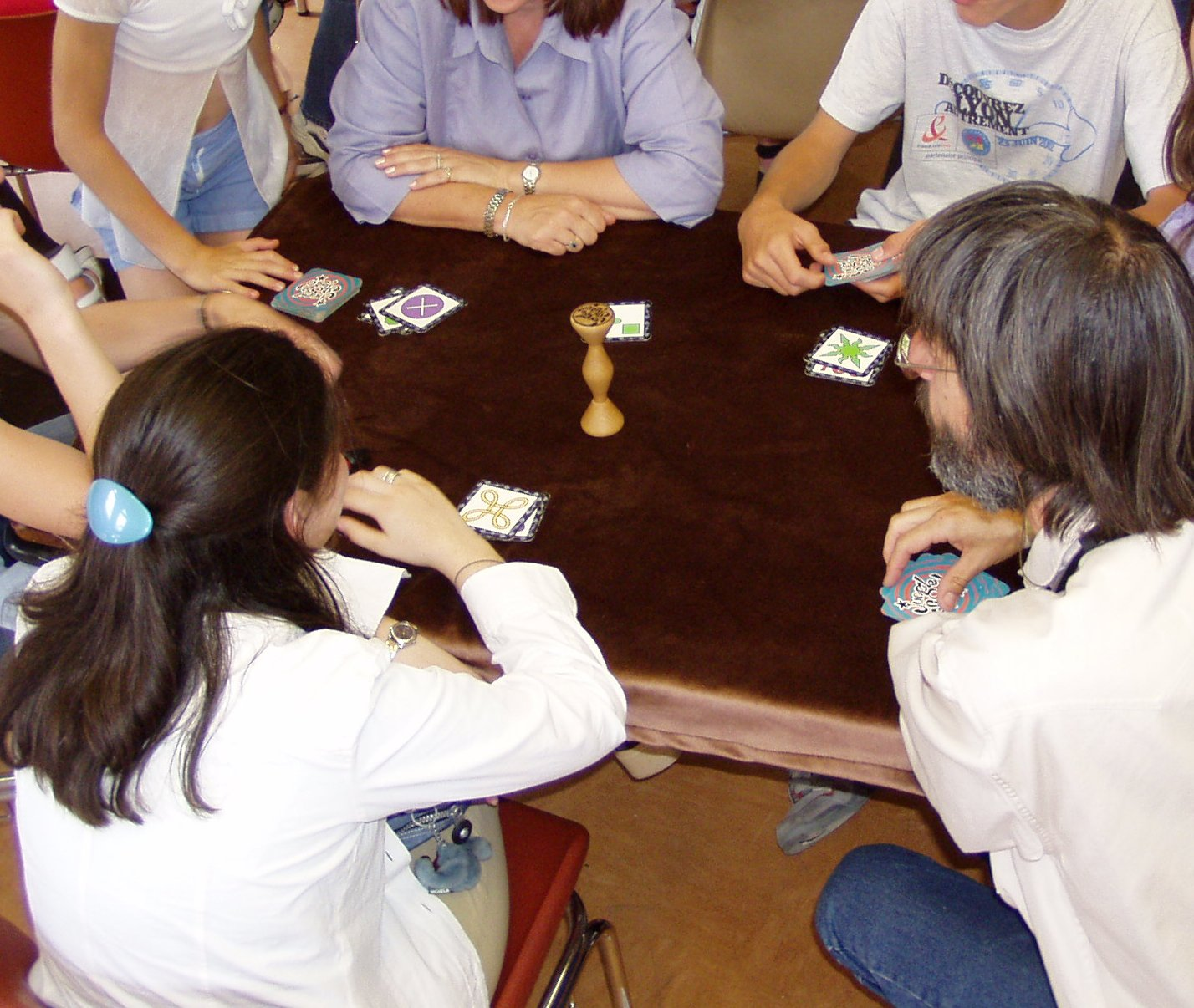 Photo prise lors du festival d'Irigny FH 22 décembre 2005 à 16:30 (CET) Catégorie:Photo de jeu de société